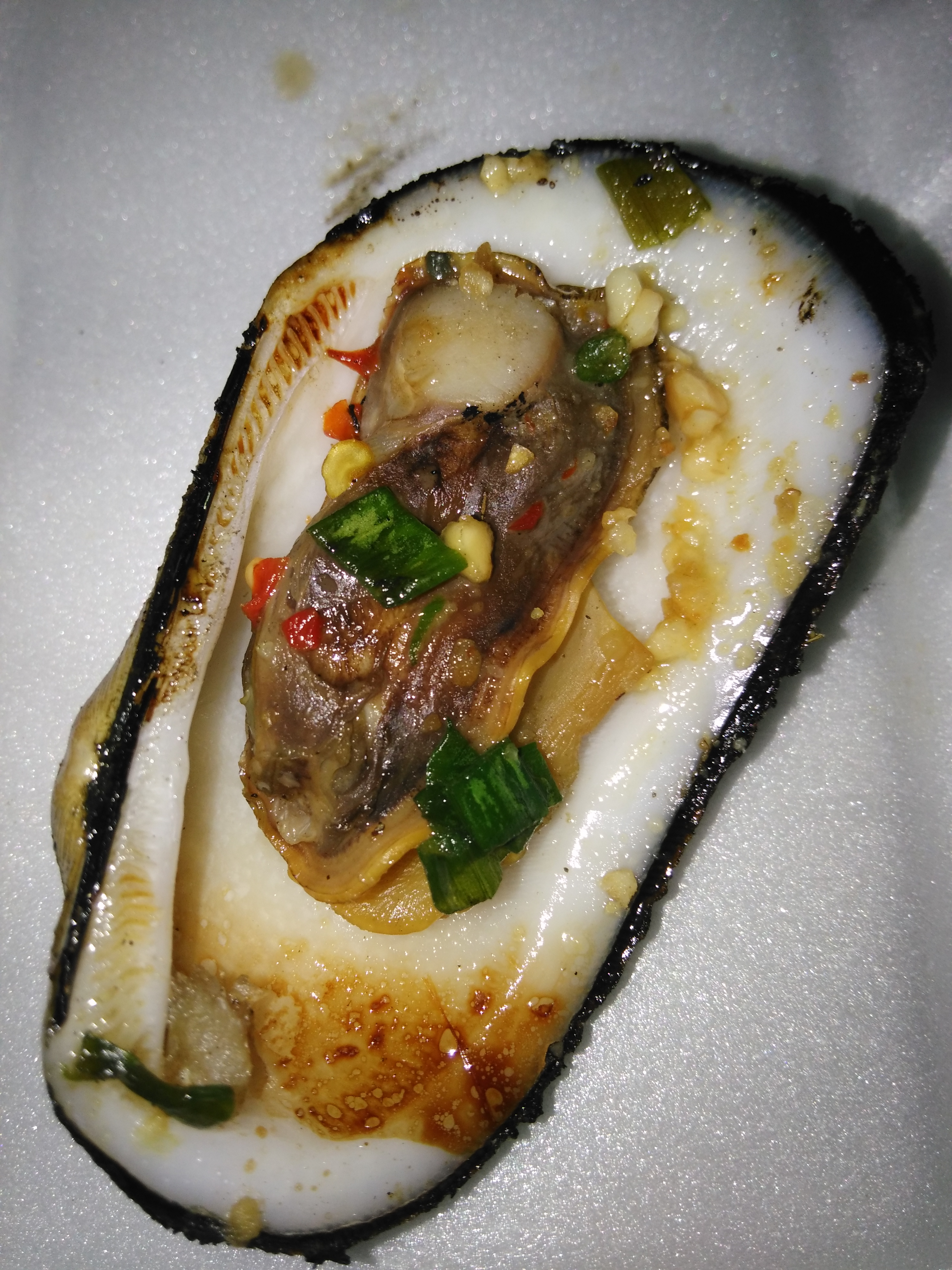 Sò quéo